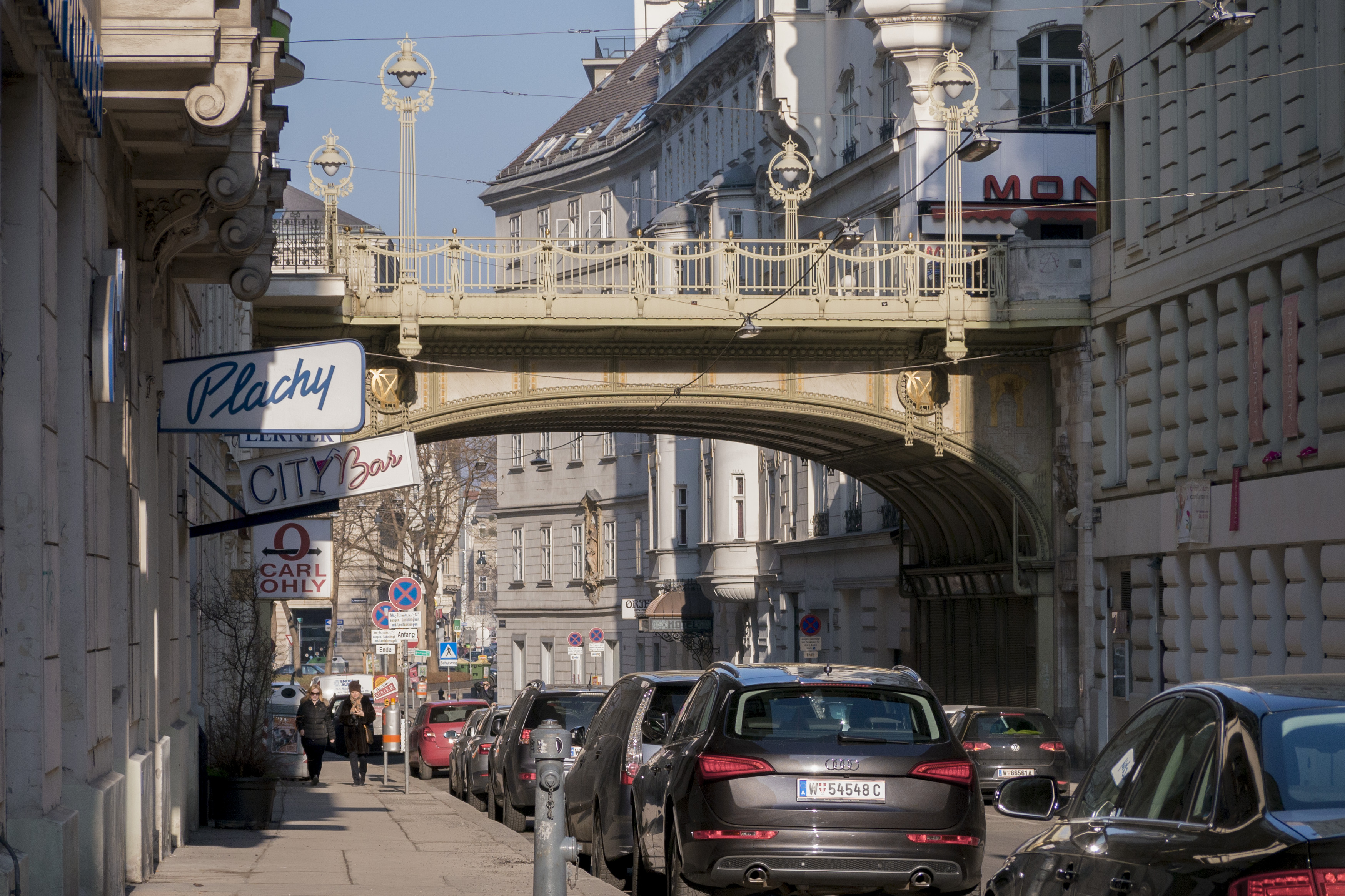 Hohe Brücke